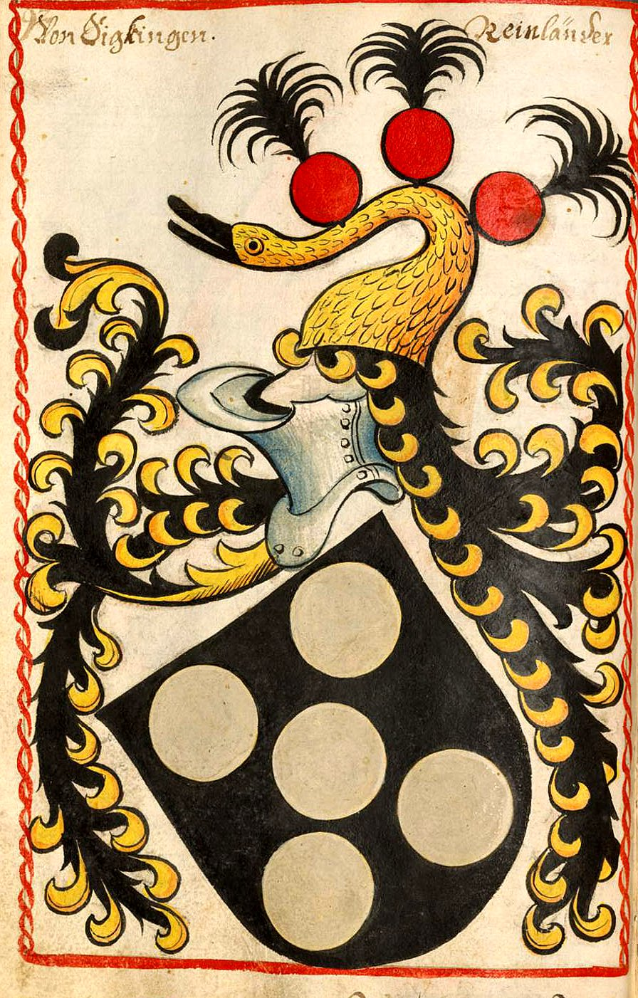 Scheibler'sches Wappenbuch , älterer Teil; Seite 92 Von Sigkingen Reinländer